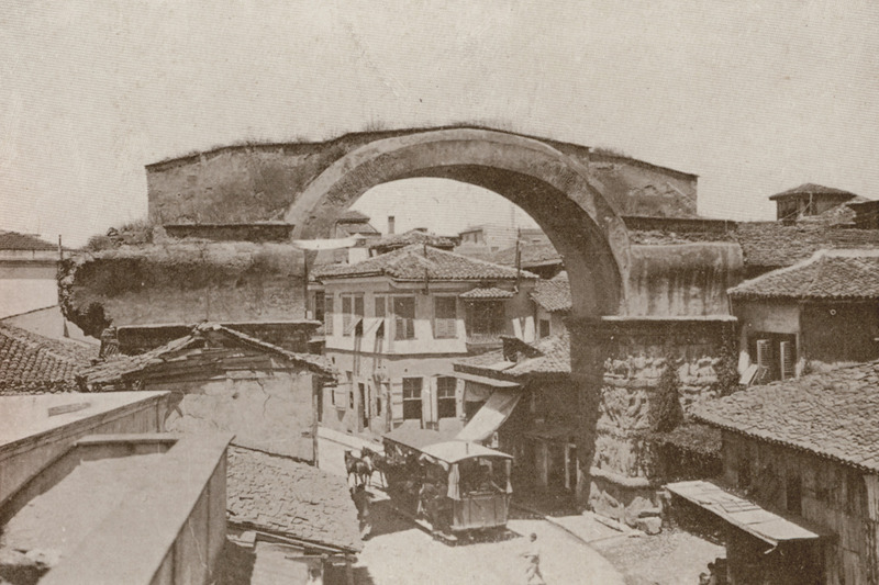 Salonique-L'arc de triomphe romain à l'entrée de la rue du Vardar vers le boulevard Hamidié - Van Den Brule Alfred - 1907